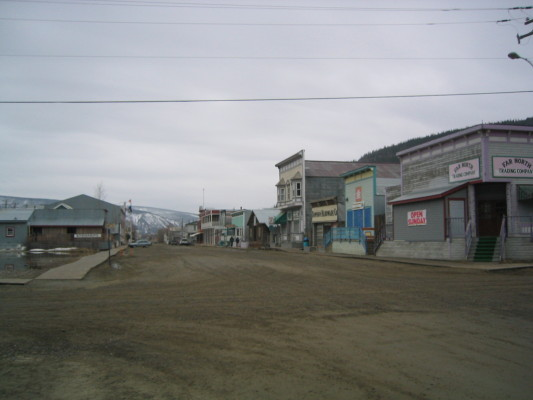 Photo personnelle, domaine public